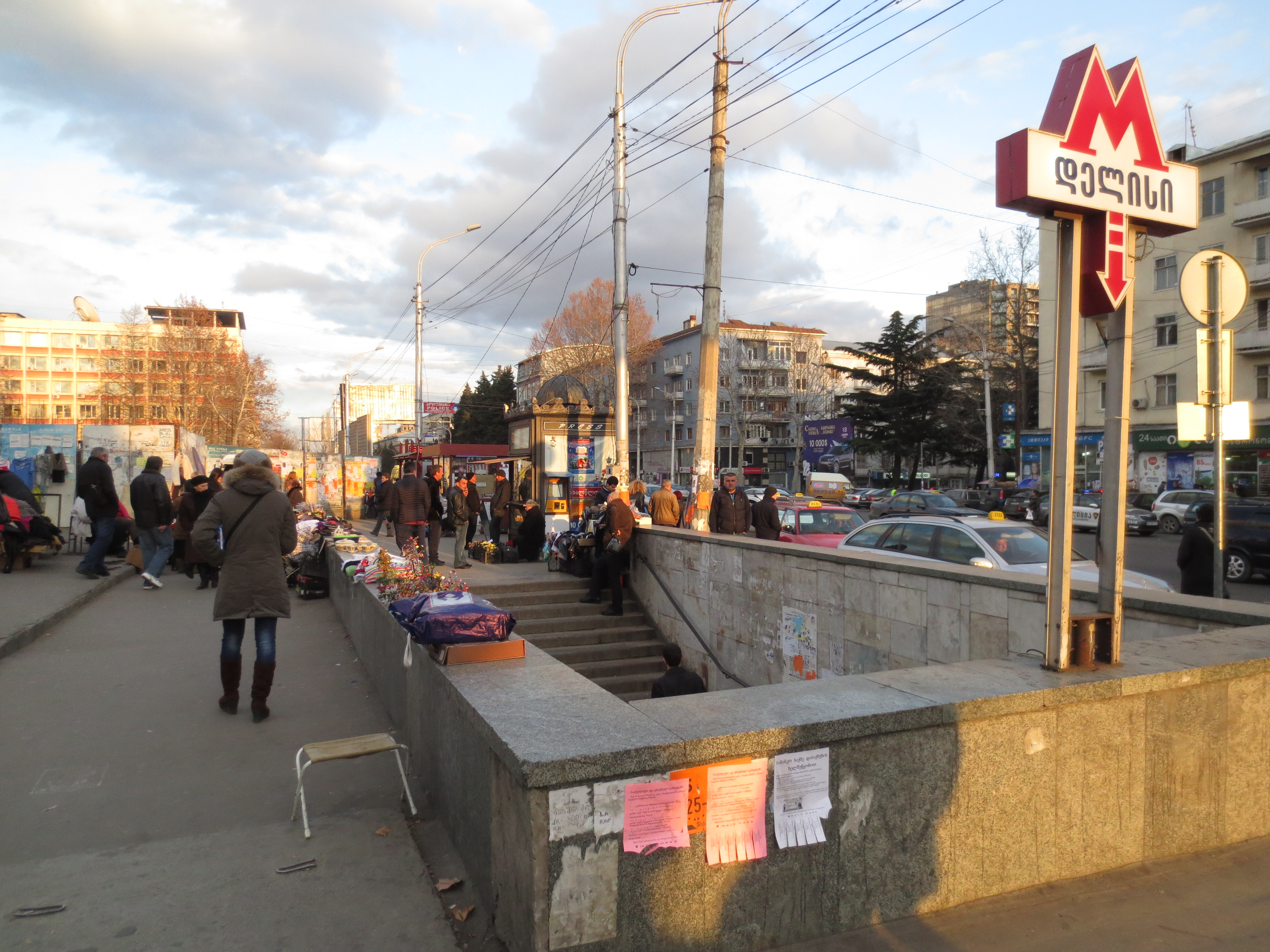 Delisi Metro Entrance